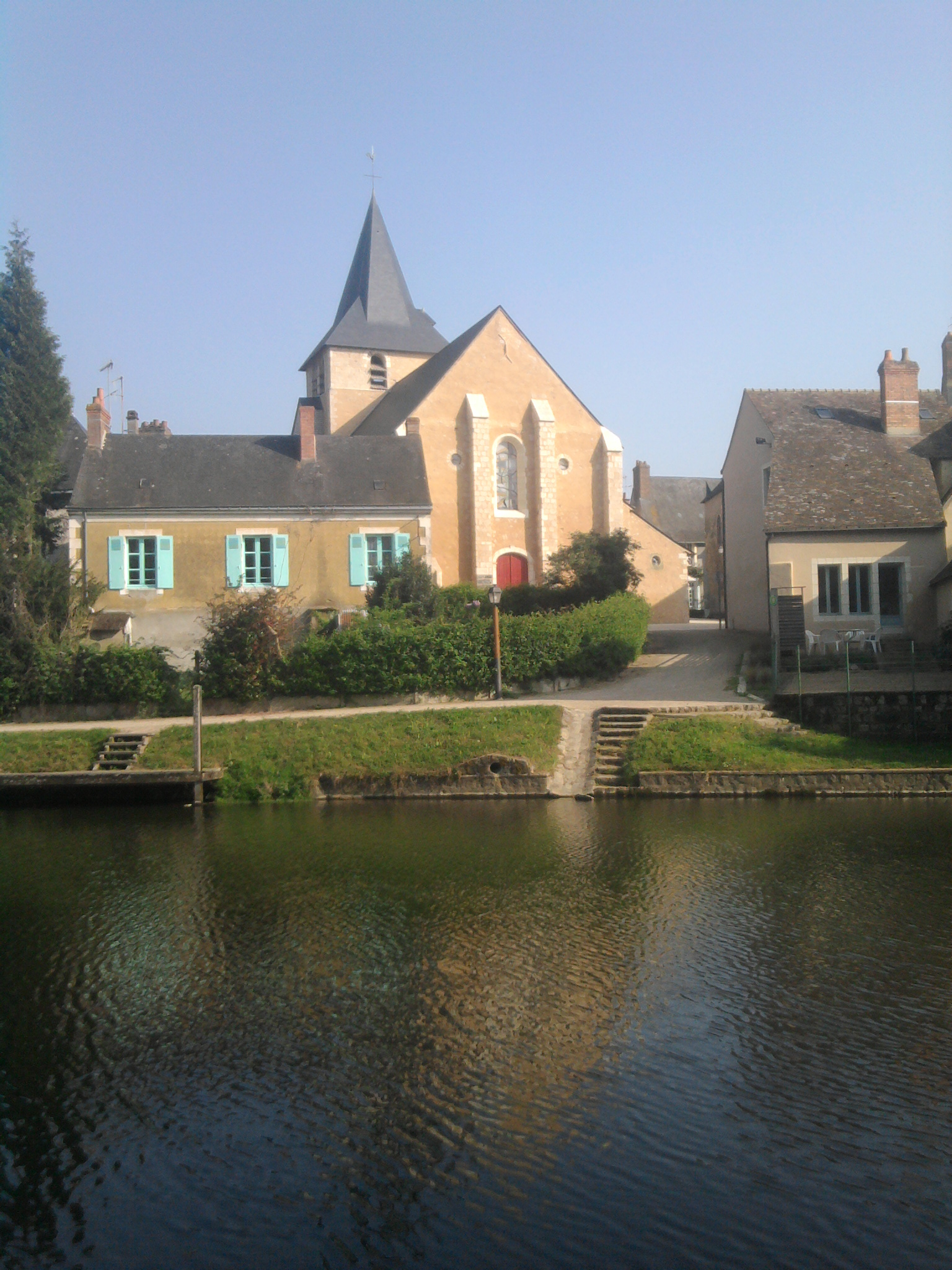 église de malicorne sur sarthe